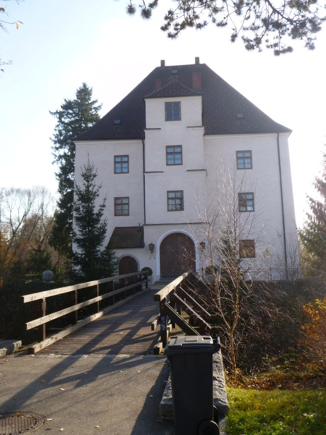 Schloss Raab - heute